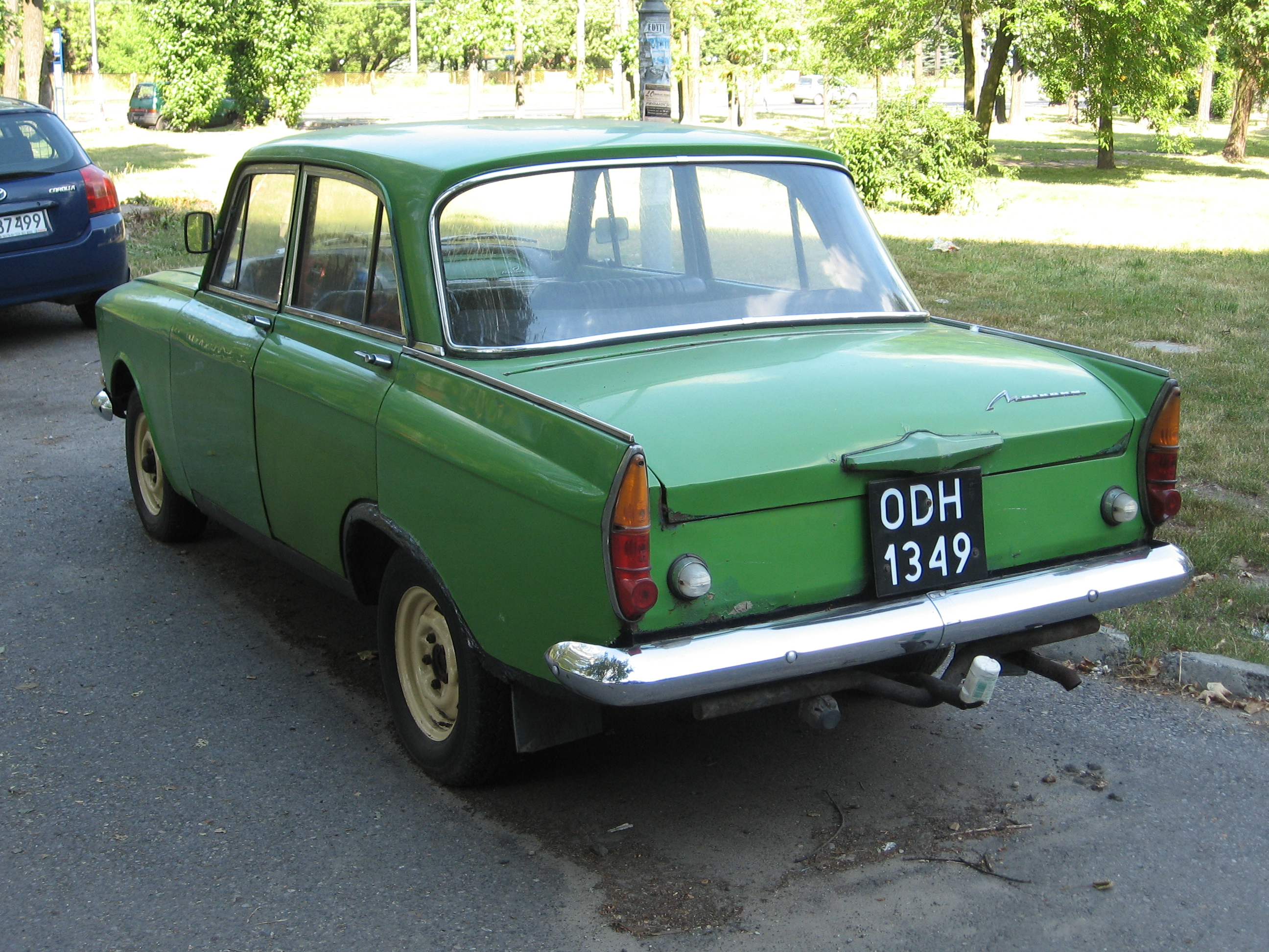 Moskvich